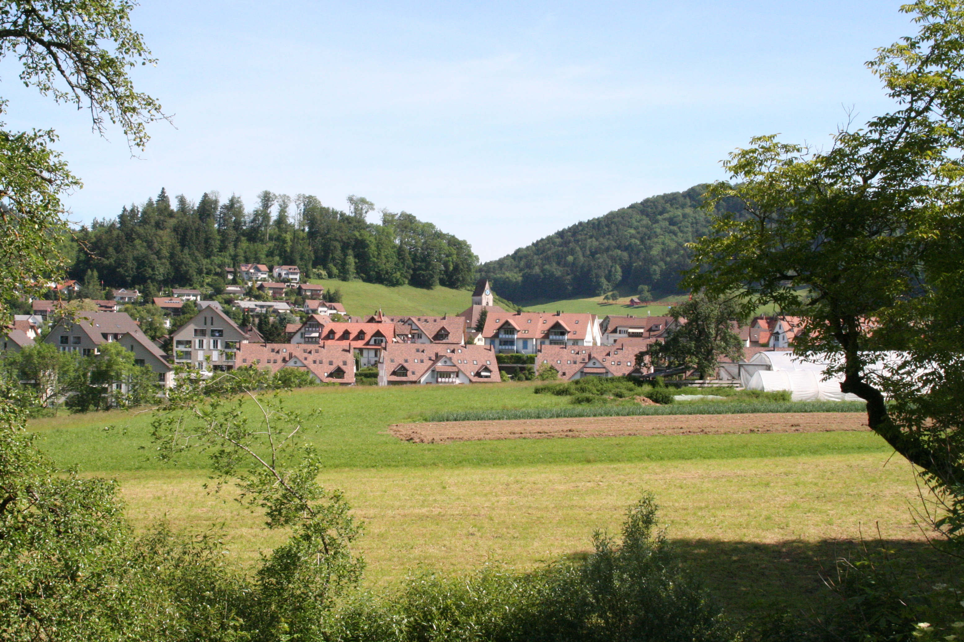 Bäretswil von Süden